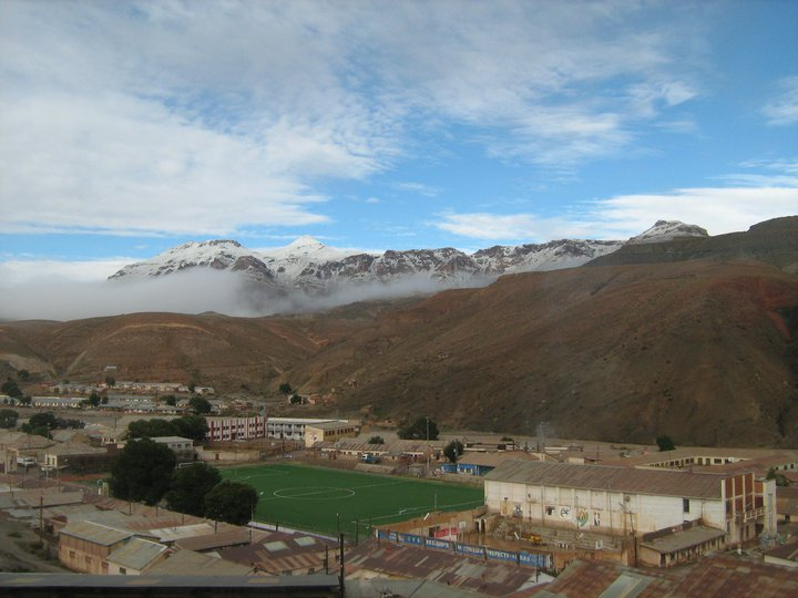 Vista Panoramica de Telamayu